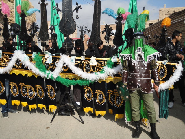 روز عاشورا در روستای شنگل آباد